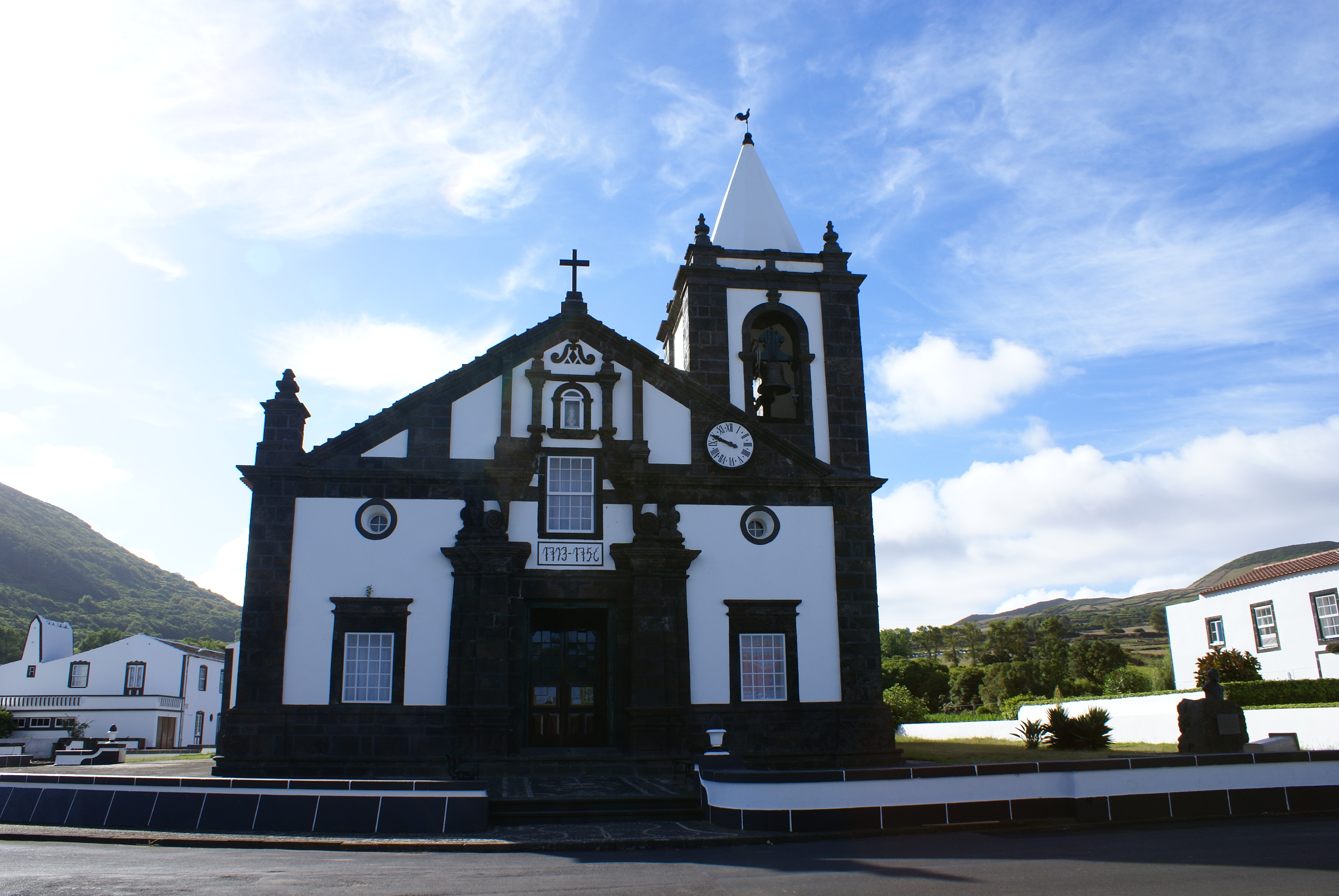 Igreja de Nossa Senhora do Guadalupe, fachada, Santa Cruz da Graciosa, ilha Graciosa, Açores, Portugal